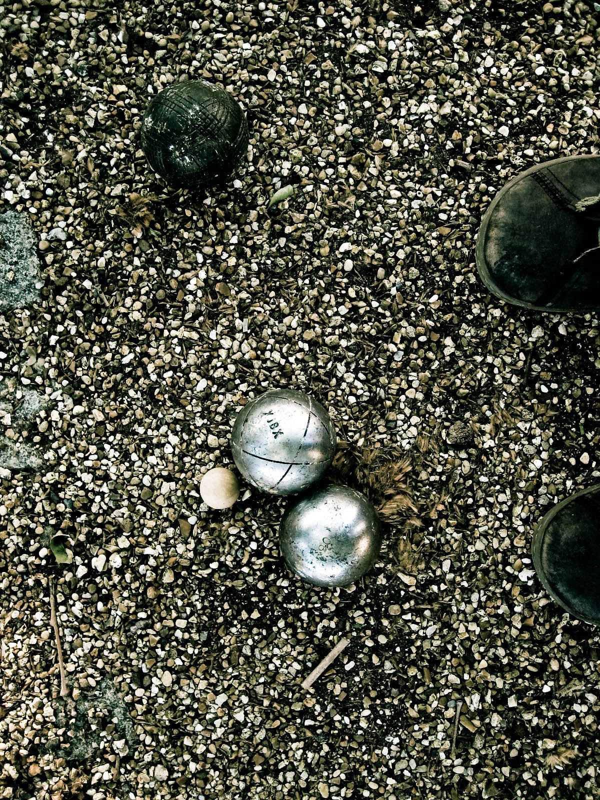 Pétanque double point